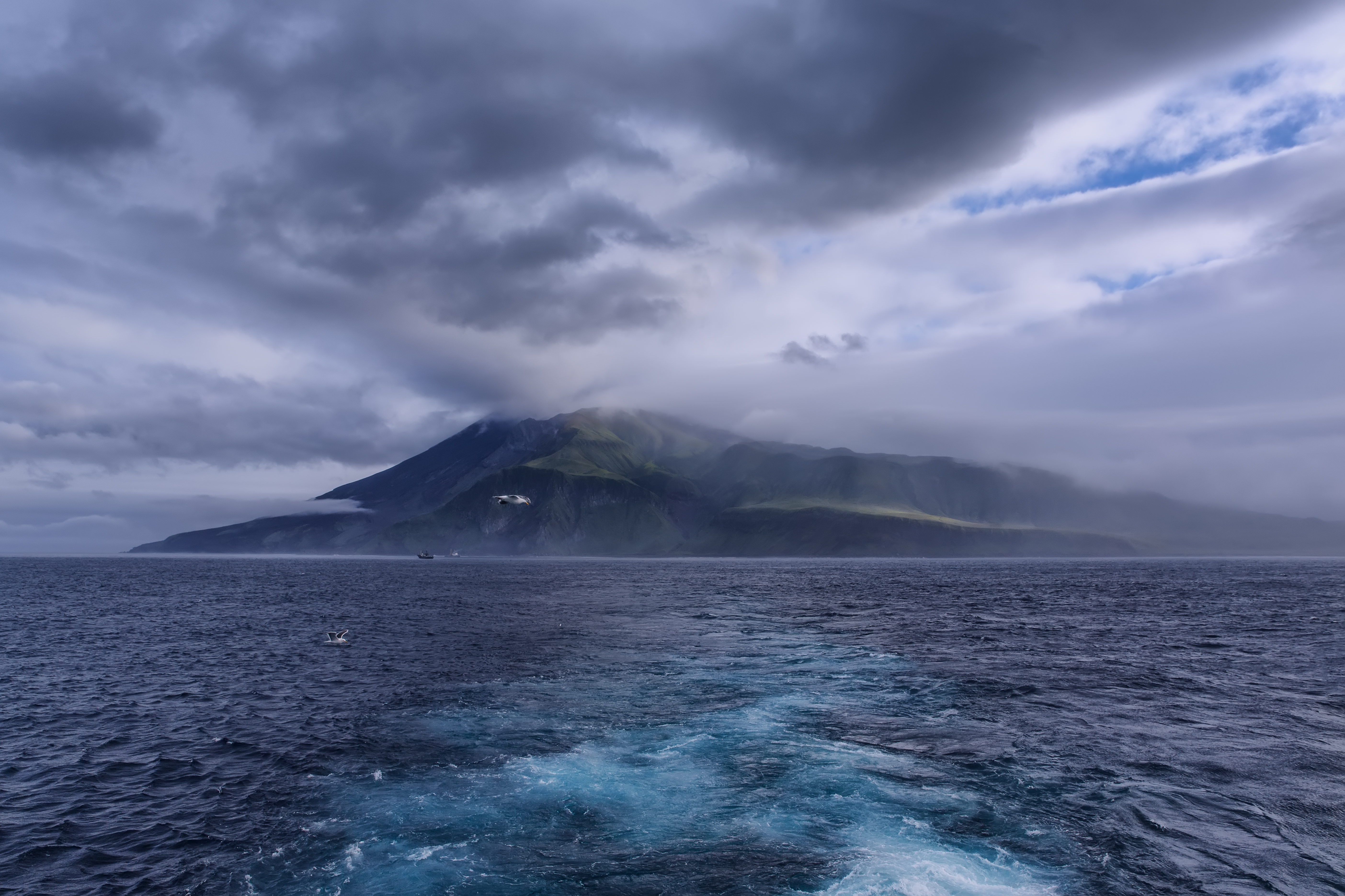 Остров Матуа: Северо-Курильский городской округ Сахалиснкой области, Сахалинская область This image is related to the protected area of Russia number 6530095